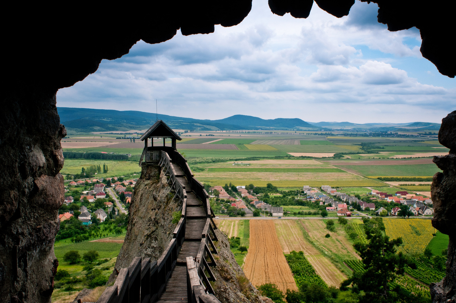 Várrom (Boldogkőváralja, Zempléni Tájvédelmi Körzet) This is a photo of a monument in Hungary. Identifier: 2684